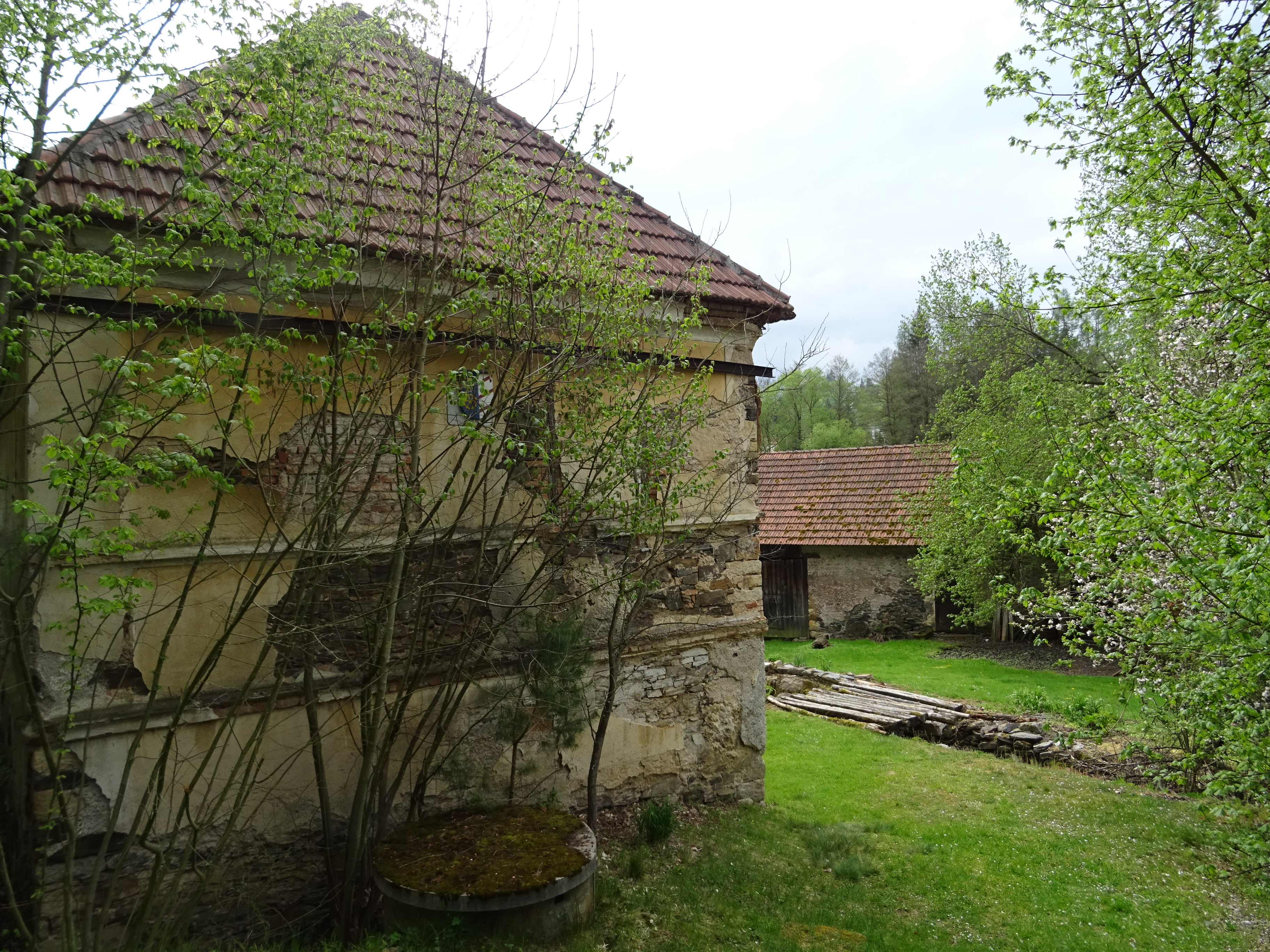 Červený mlýn